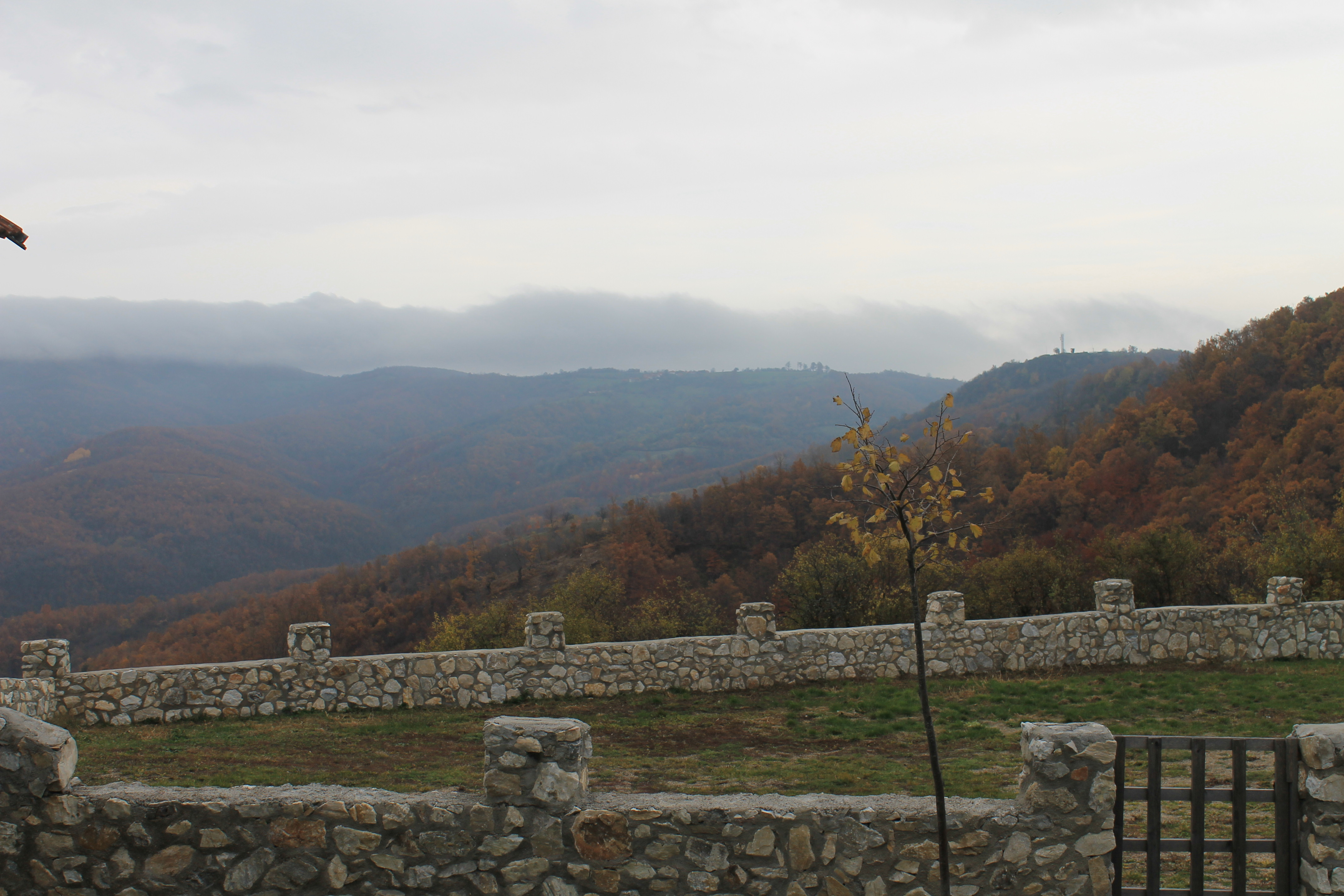 Pamje e Maleve të Karadakut , fshati Kokaj , Gjilan